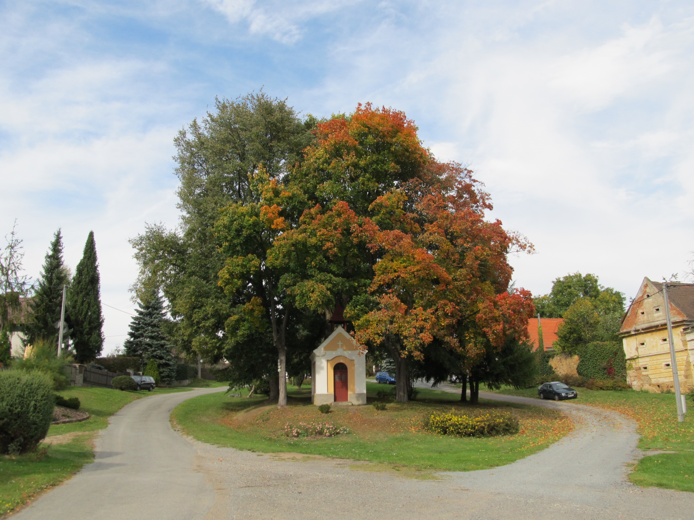 Kůští - náves